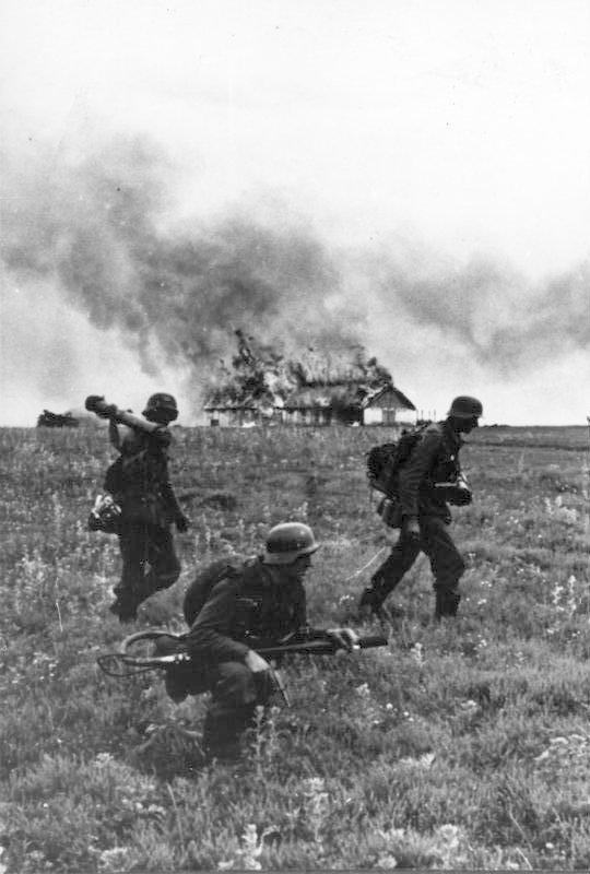 PK Kempe Infantrie-Division "Großdeutschland" stürmt ein befestigtes Dorf der Sowjets.